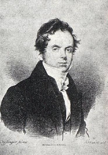 Le baron Guillaume-Isidore de Montbel, député, ministre, et maire de Toulouse de 1826 à 1829.